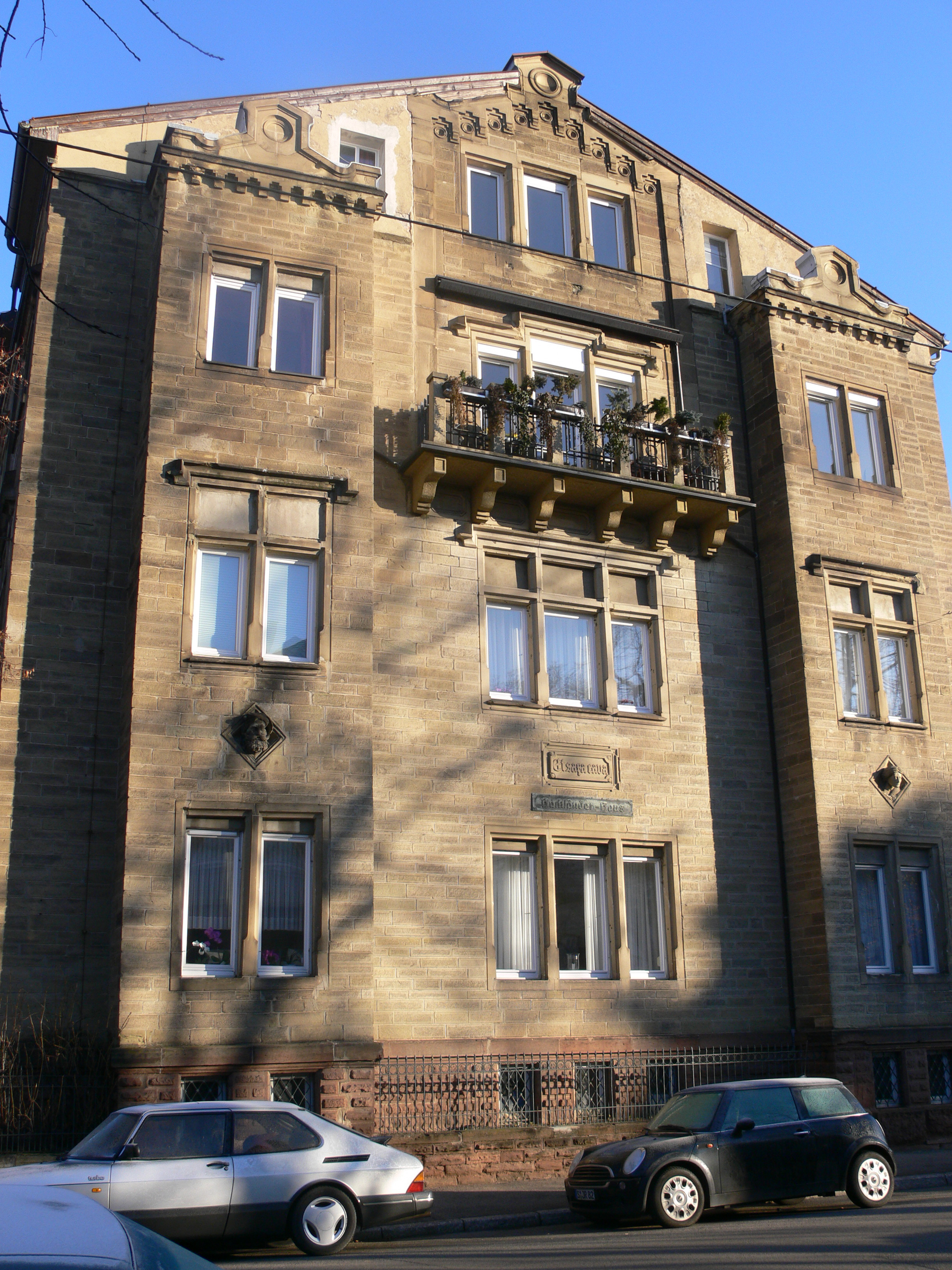 Haus des Schriftstellers F. W. Hackländer, Schoderstraße 7, Stuttgart-Nord Erbaut 1859 von Christian Friedrich Leins, ursprünglicher Standort an der Urbanstraße (bis 1910), von den Architekten Bihl & Woltz unter Verwendung der alten Materialien in seiner alten Form an der Schoderstraße wieder aufgebaut